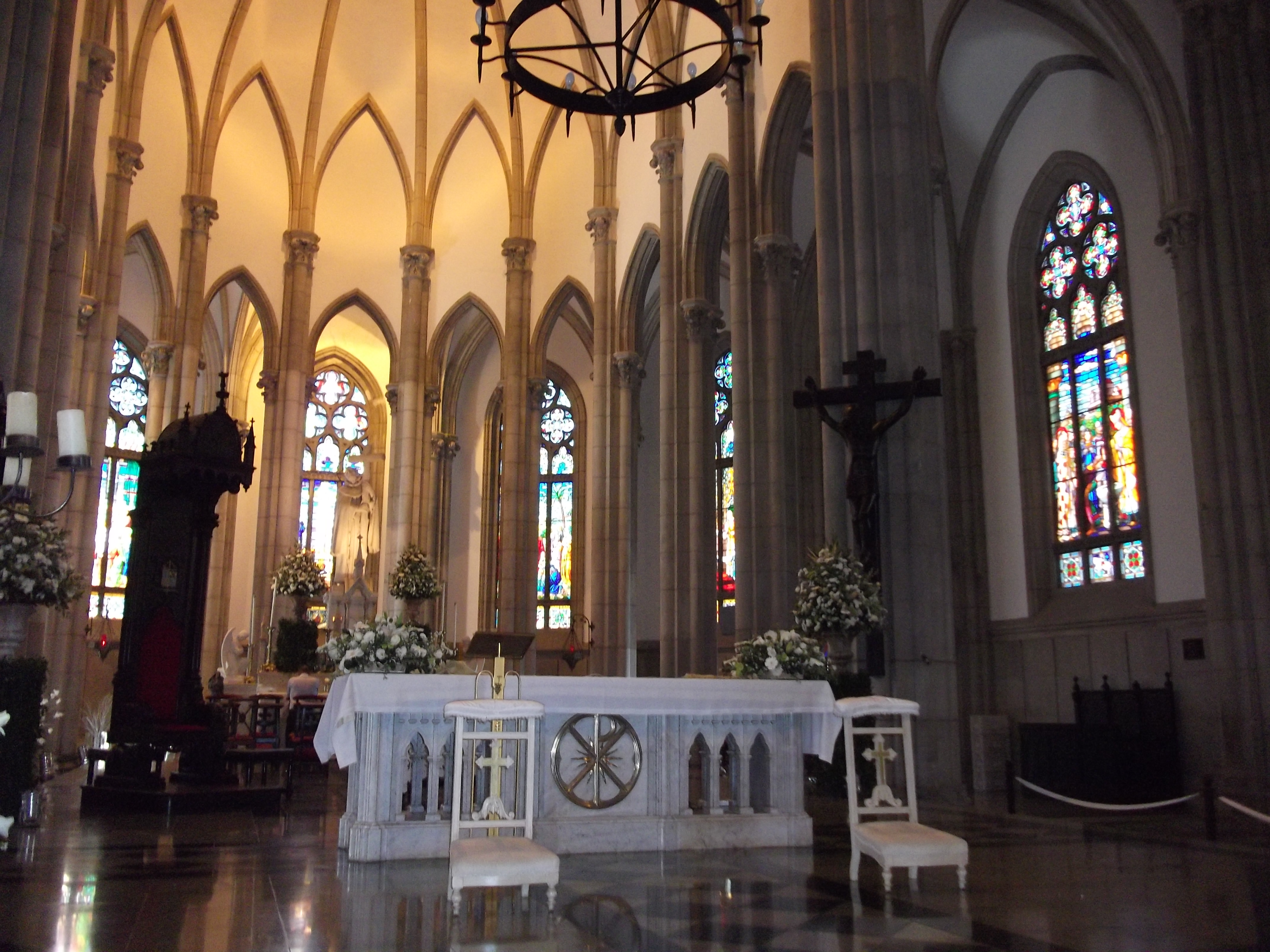 Catedral de São Pedro de Alcântara (Petrópolis, estado do Rio de Janeiro, Brasil) : Altar